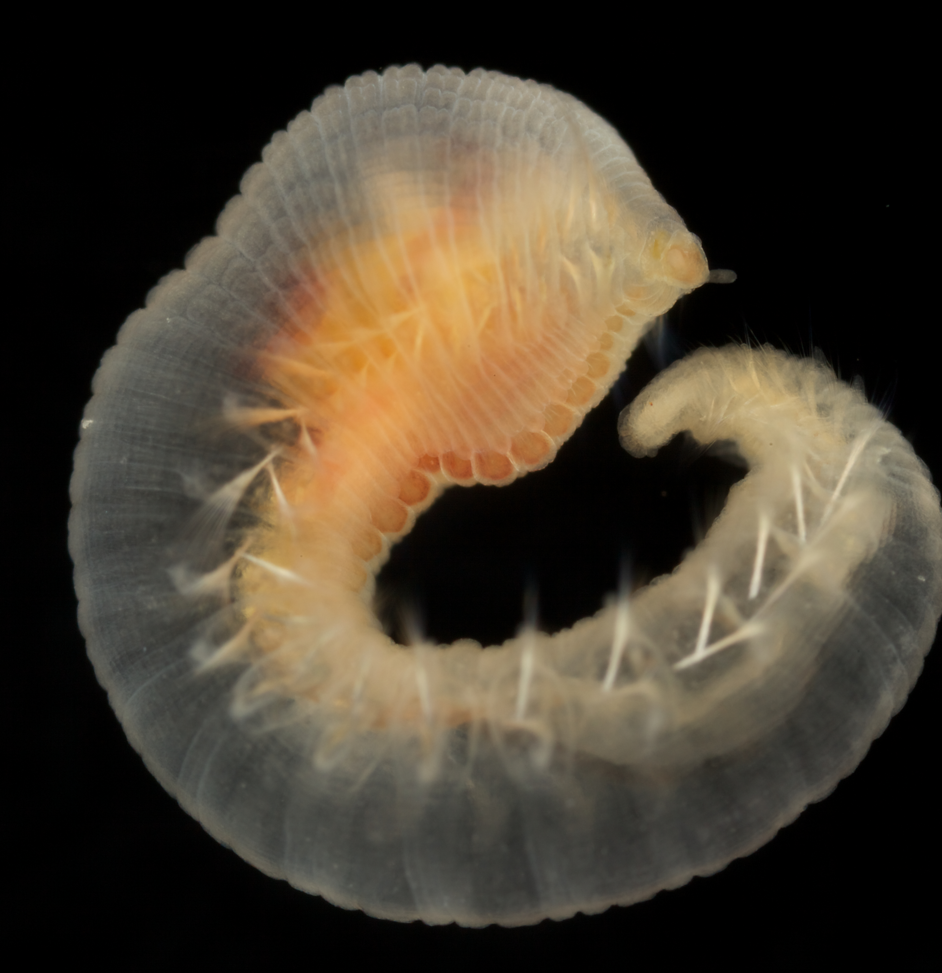 Pseudoscalibregma parvum